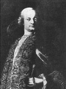 Karel Blažej Kopřiva (1756 - 1785), Český hudební skladatel, varhaník a regenschori.